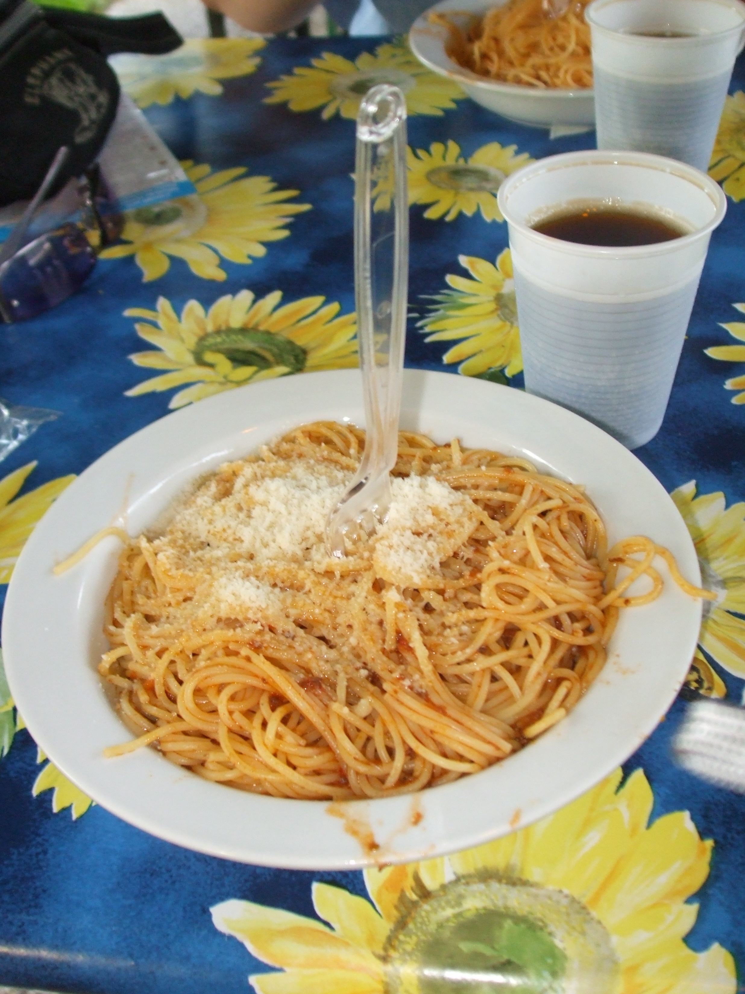 spagetti